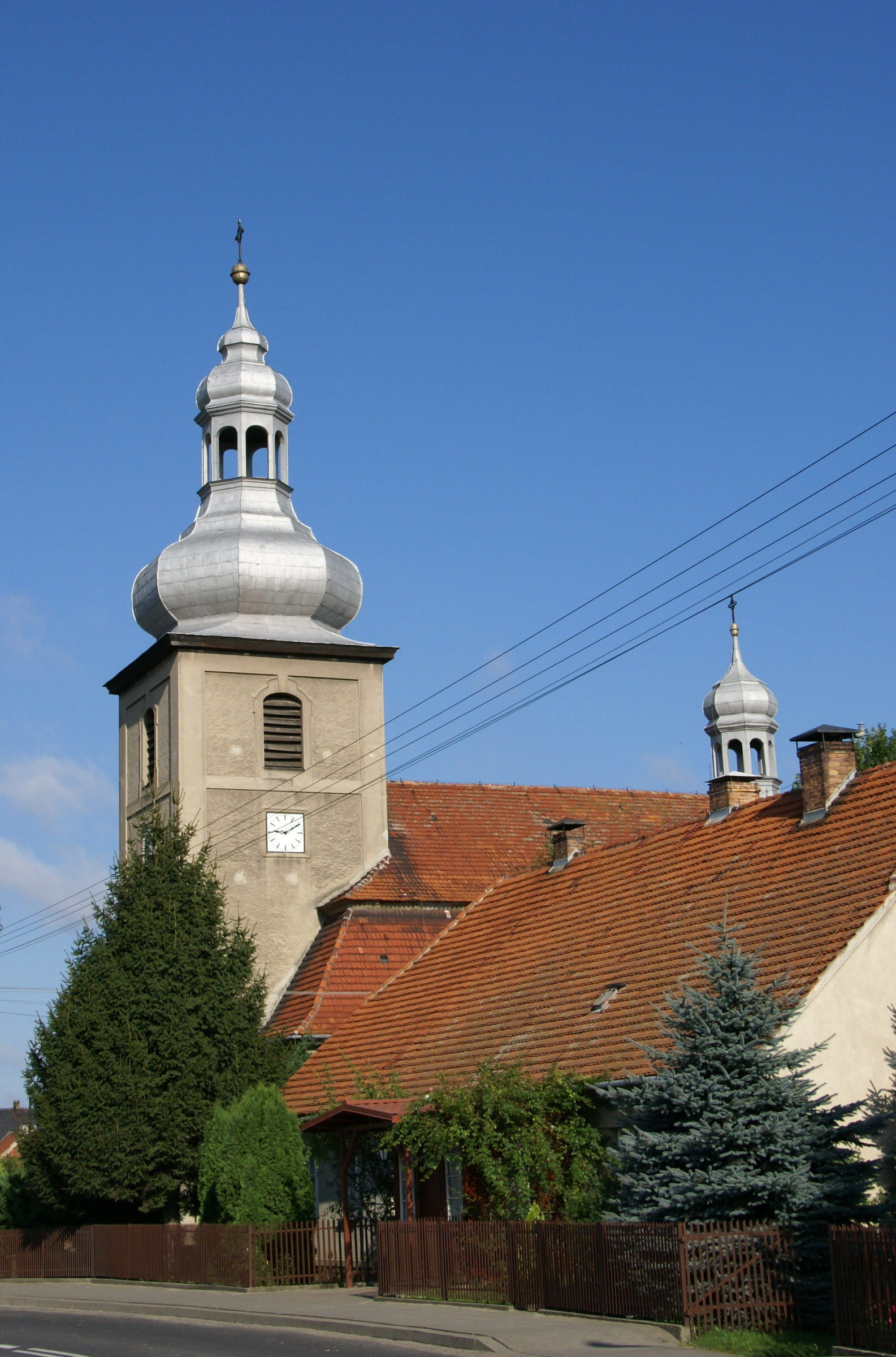 Kunowo - kościół parafialny pw. św. Andrzeja Apostoła z 1909 r. (zabytek nr 730/Wlkp/A)